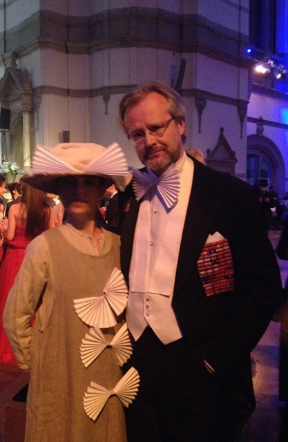 Anna Bengtsson och Ola Wallin på SFbalen 23aug14